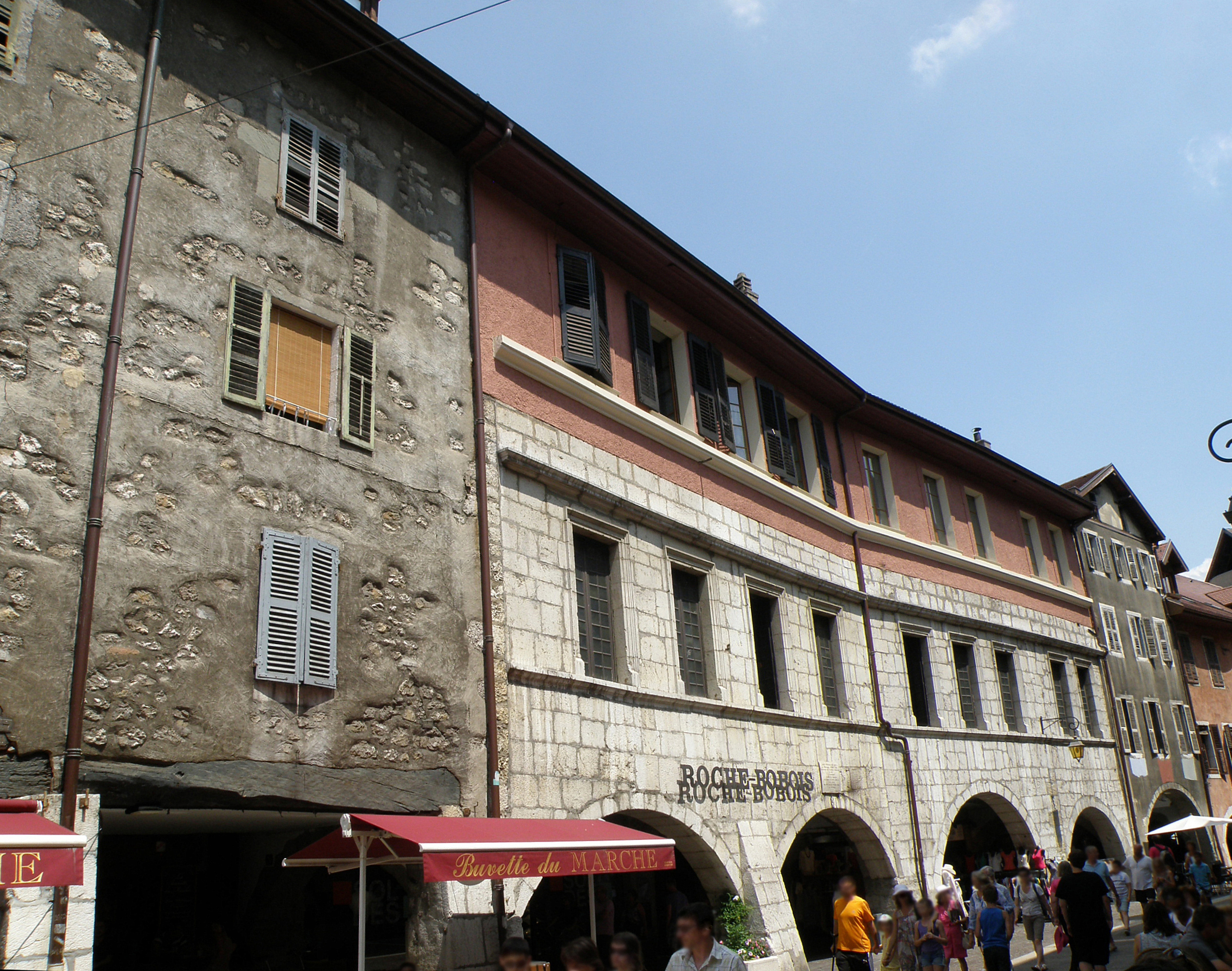 Hôtel Bagnoréa (n°18 de la Rue Sainte-Claire), Annecy, Haute-Savoie, France).